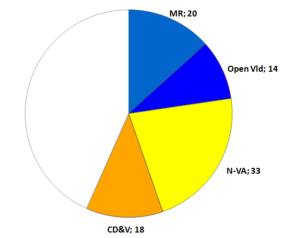 Meerderheid van regering-Michel in de Kamer.